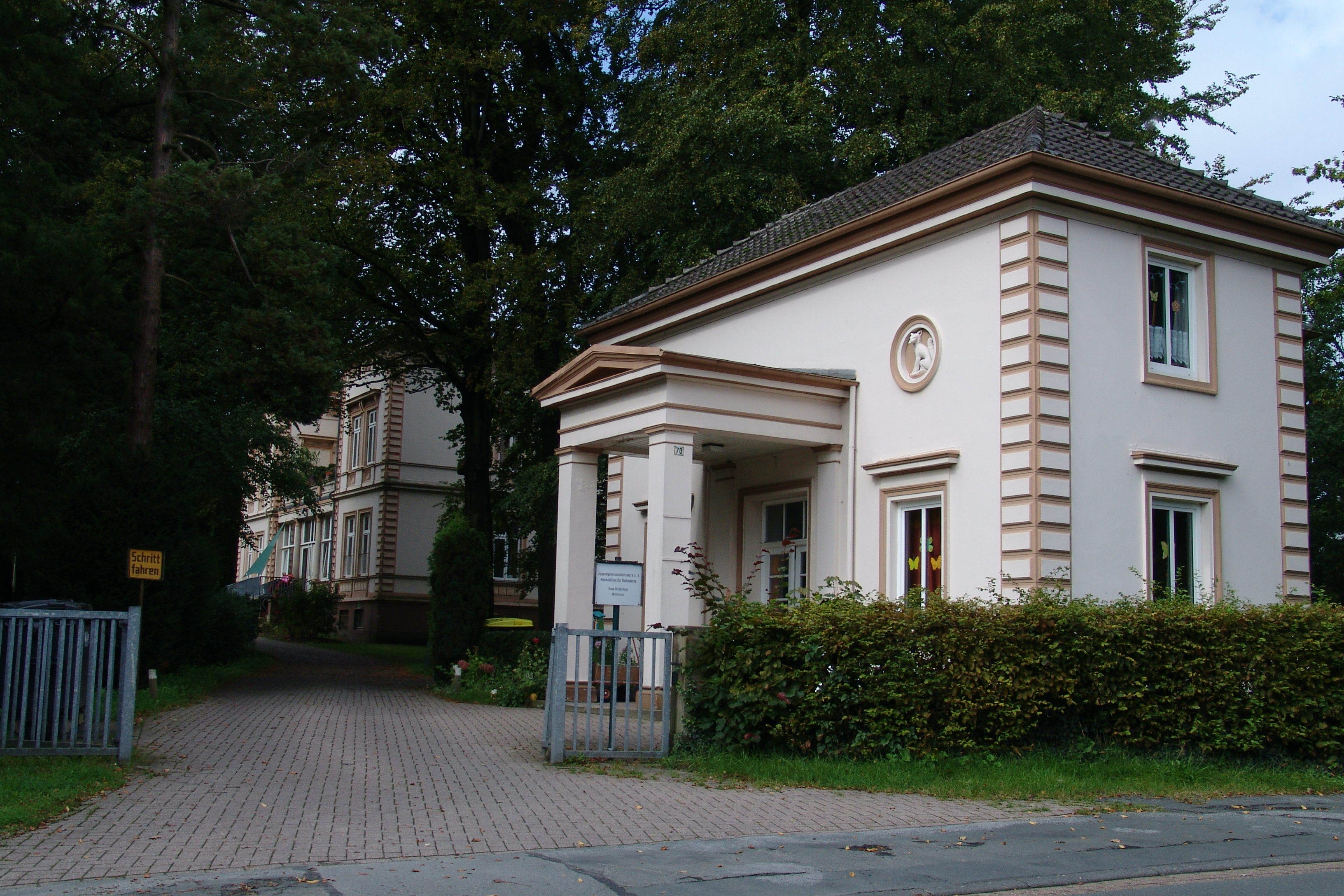 Rauchs Landgut, Jugendgemeinschaftswerk e.V. in Bremen, Richthofenstraße 70.Die Gesamtanlage ist ein geschütztes Kulturdenkmal in der Freien Hansestadt Bremen, mit der Nr. 1308 beim Landesamt für Denkmalpflege registriert.